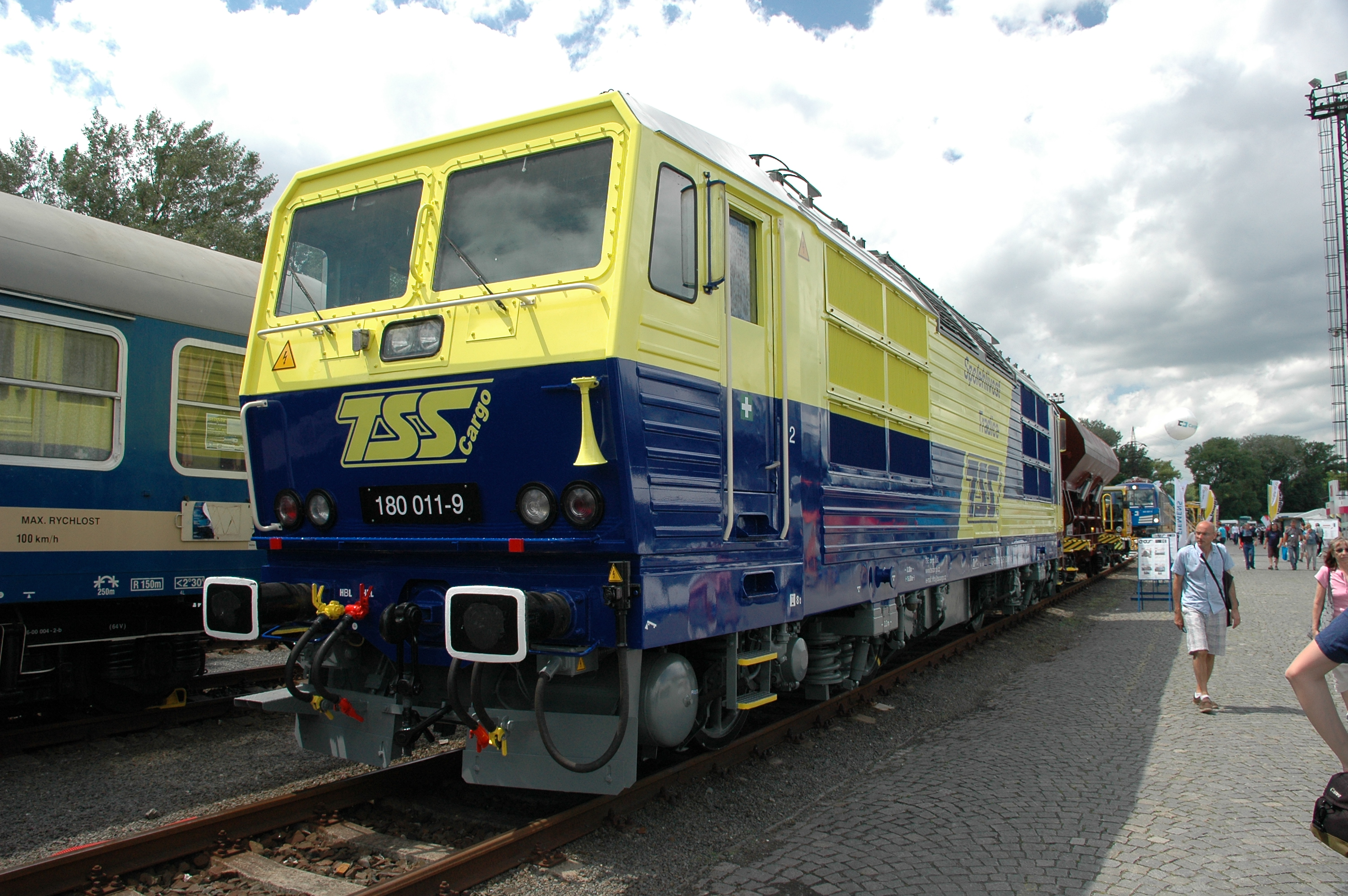 Původem německý Bastard